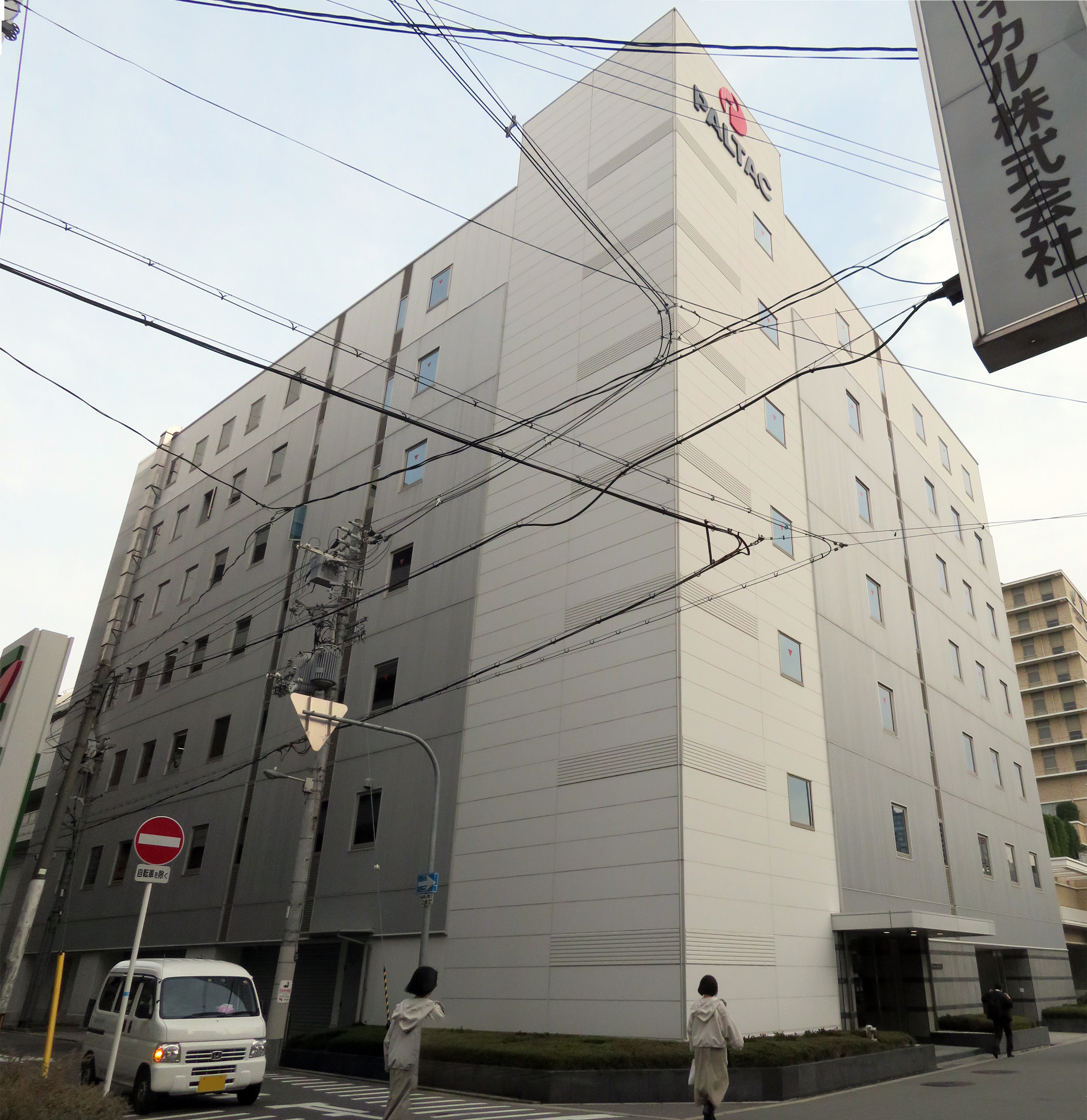 株式会社PALTAC本社を撮影。